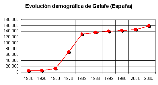 Gráfico de la evolución demográfia de Getafe (España) durante el siglo XX y XXI.